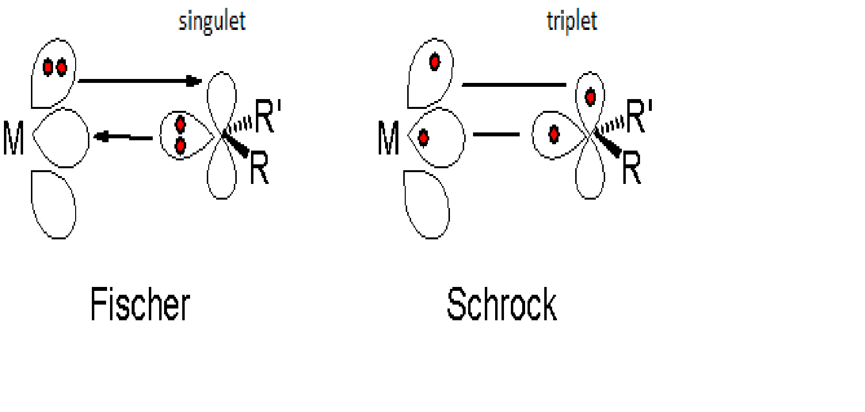 Transitional metal carbenes